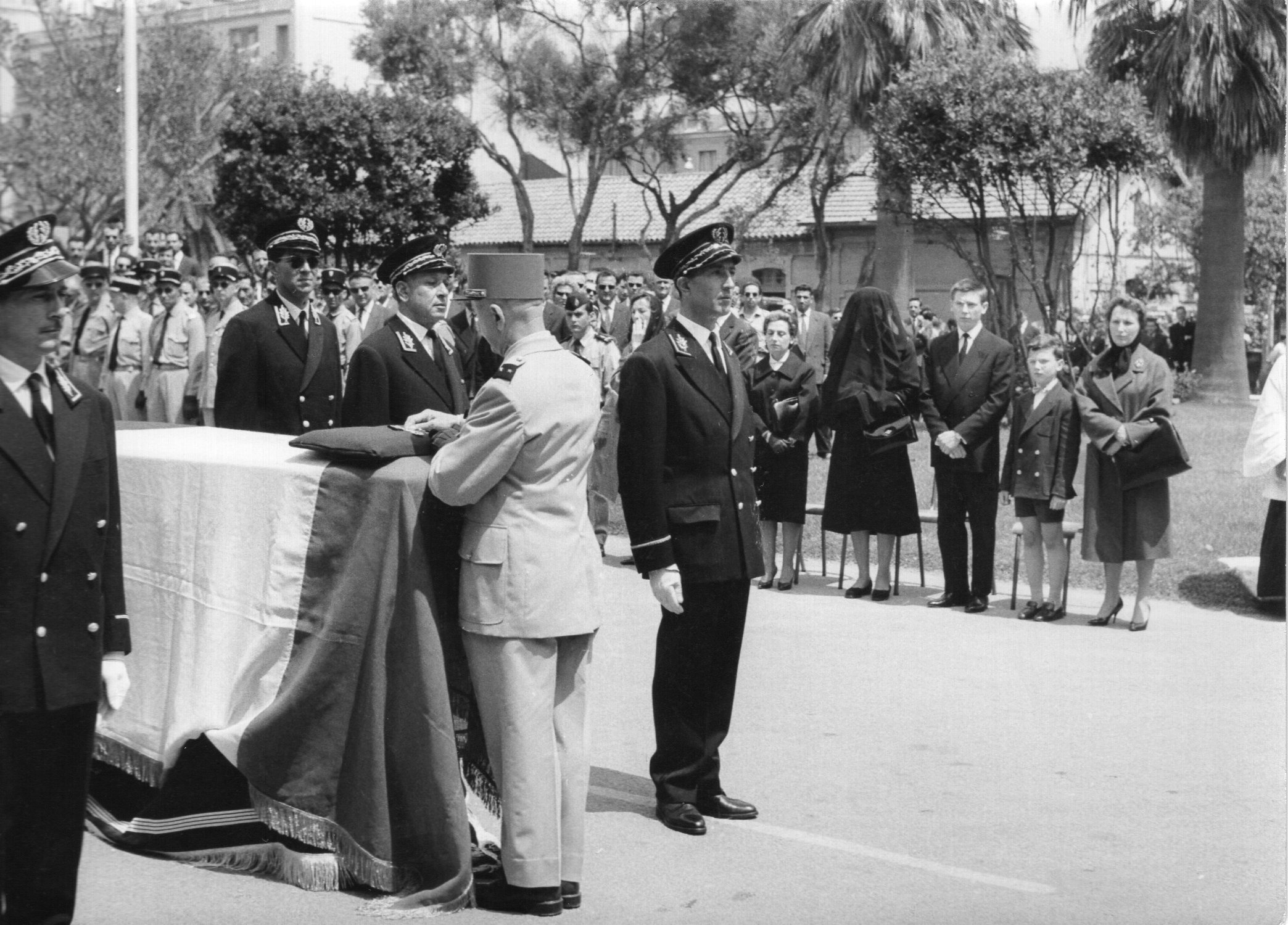 Cérémonie d'obsèques de Roger Gavoury en la cour de l’École de police d’Hussein-Dey à Alger le 3 juin 1961